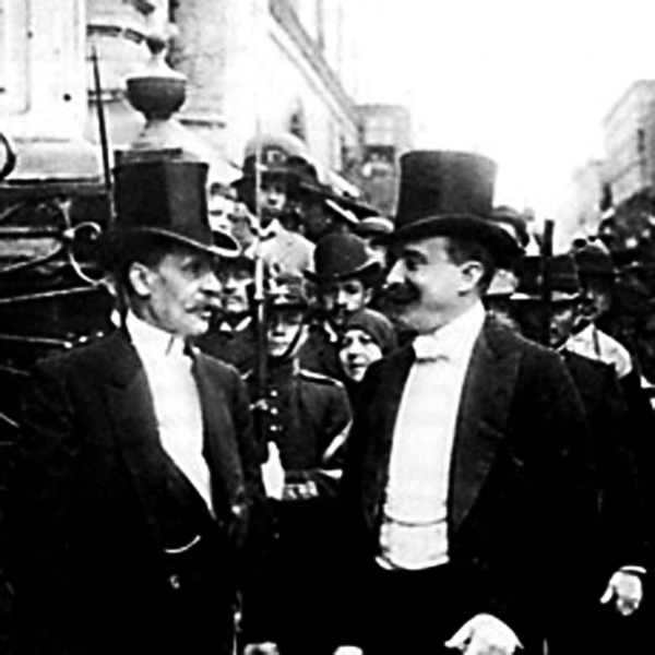 Jose Pardo Barreda y Manuel Candamo